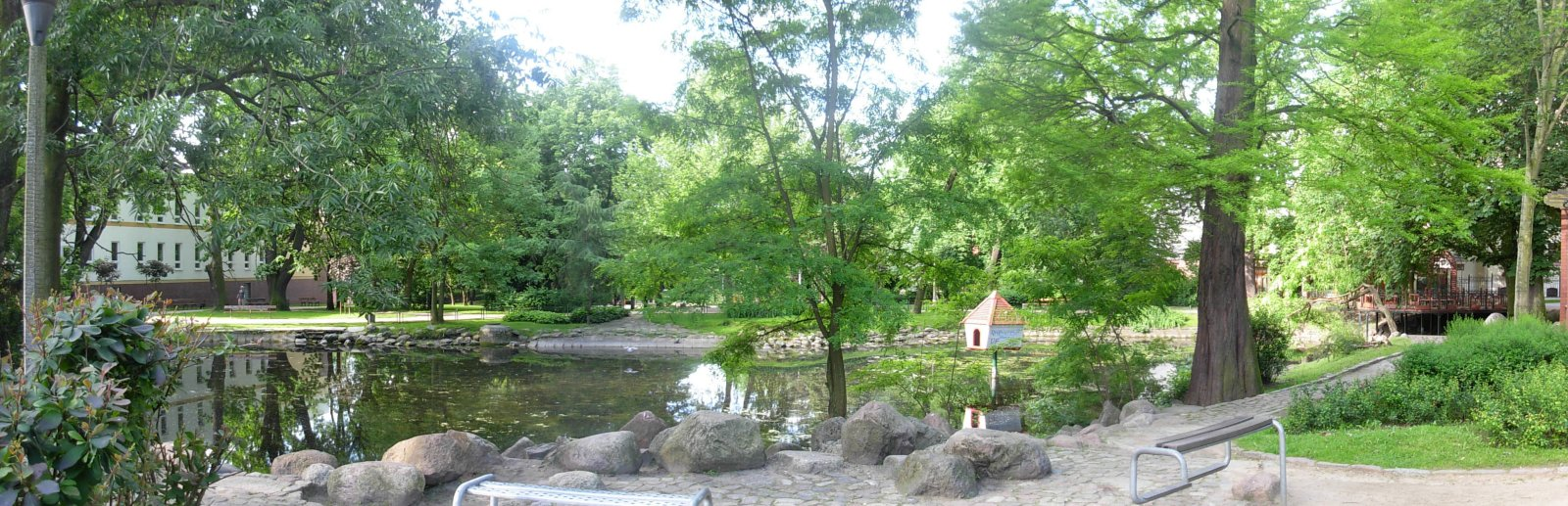 Staw północny w parku Kazimierza Wielkiego w Bydgoszczy